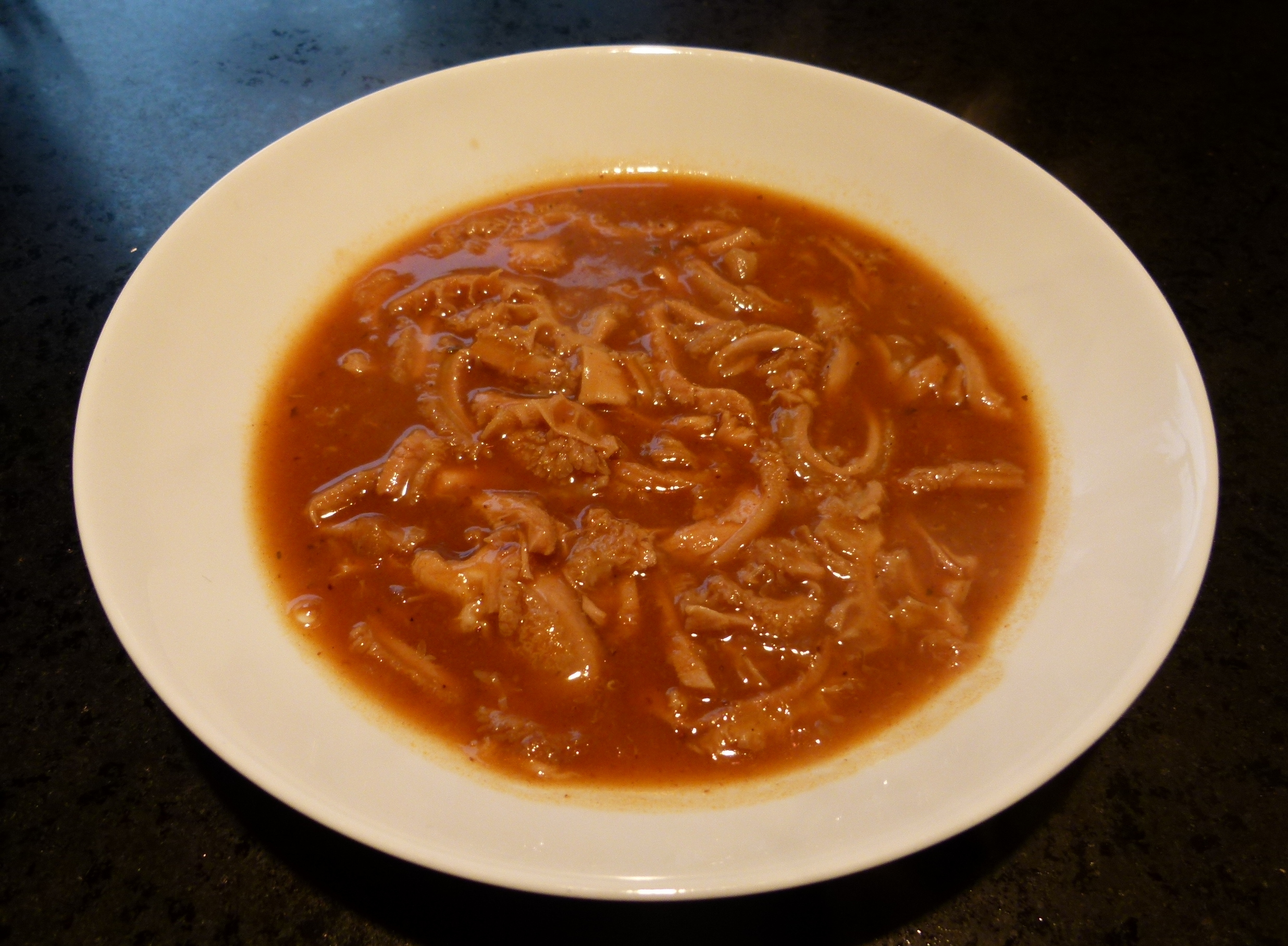 Schwäbische "Saure Kutteln", Bauernmarkt Schwäbisch Hall bei Stuttgart